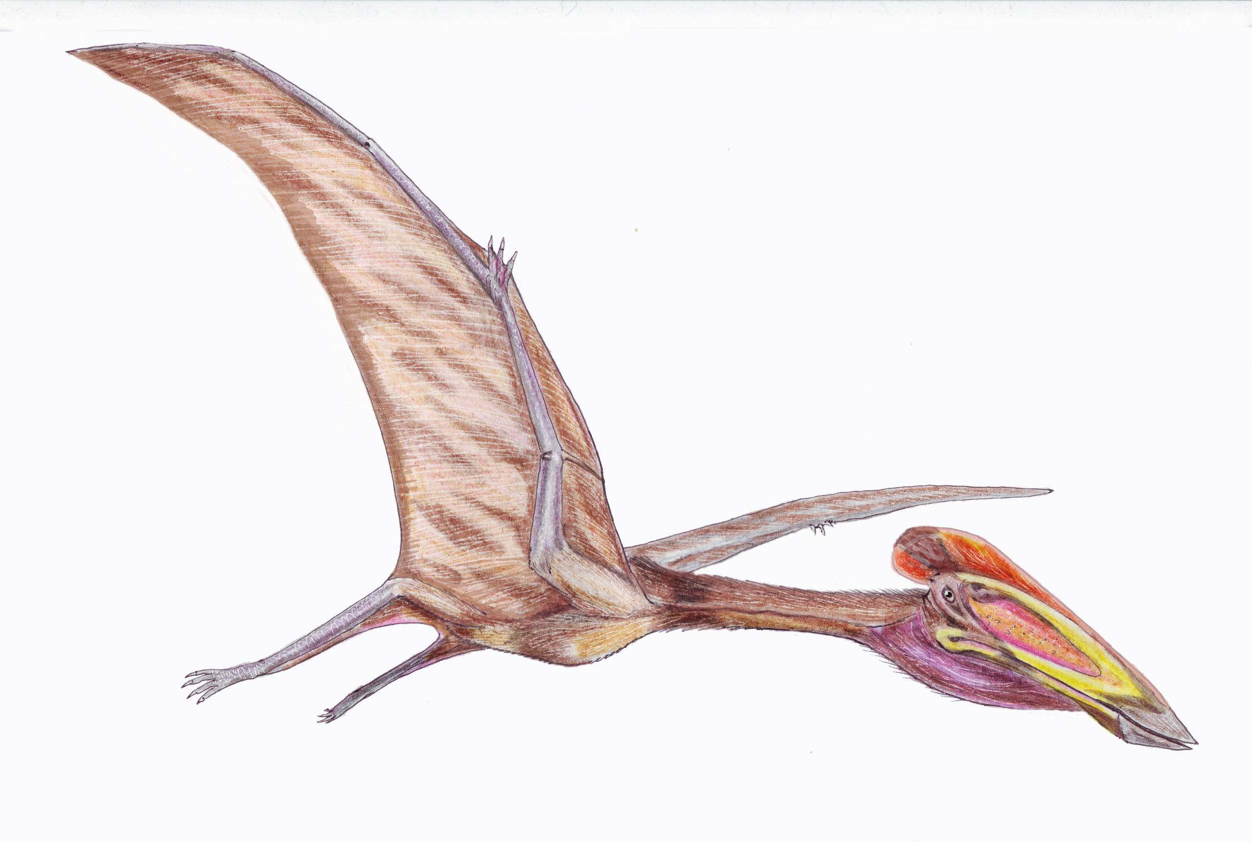 Bakonydraco galaczi